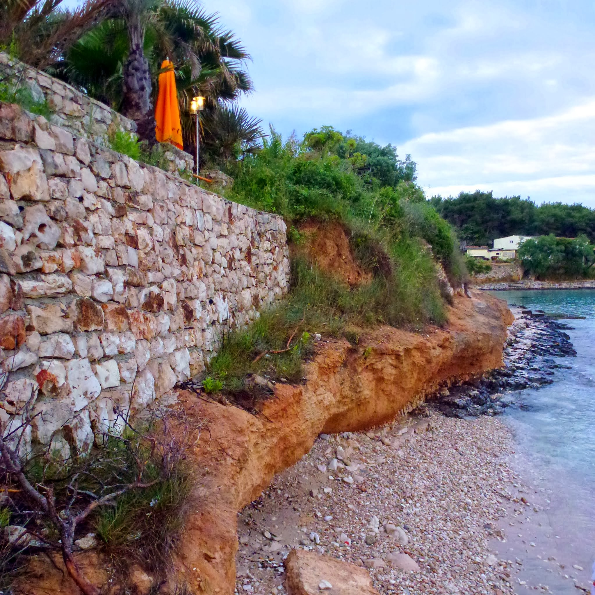 Остров Святой Клемент, Croatia